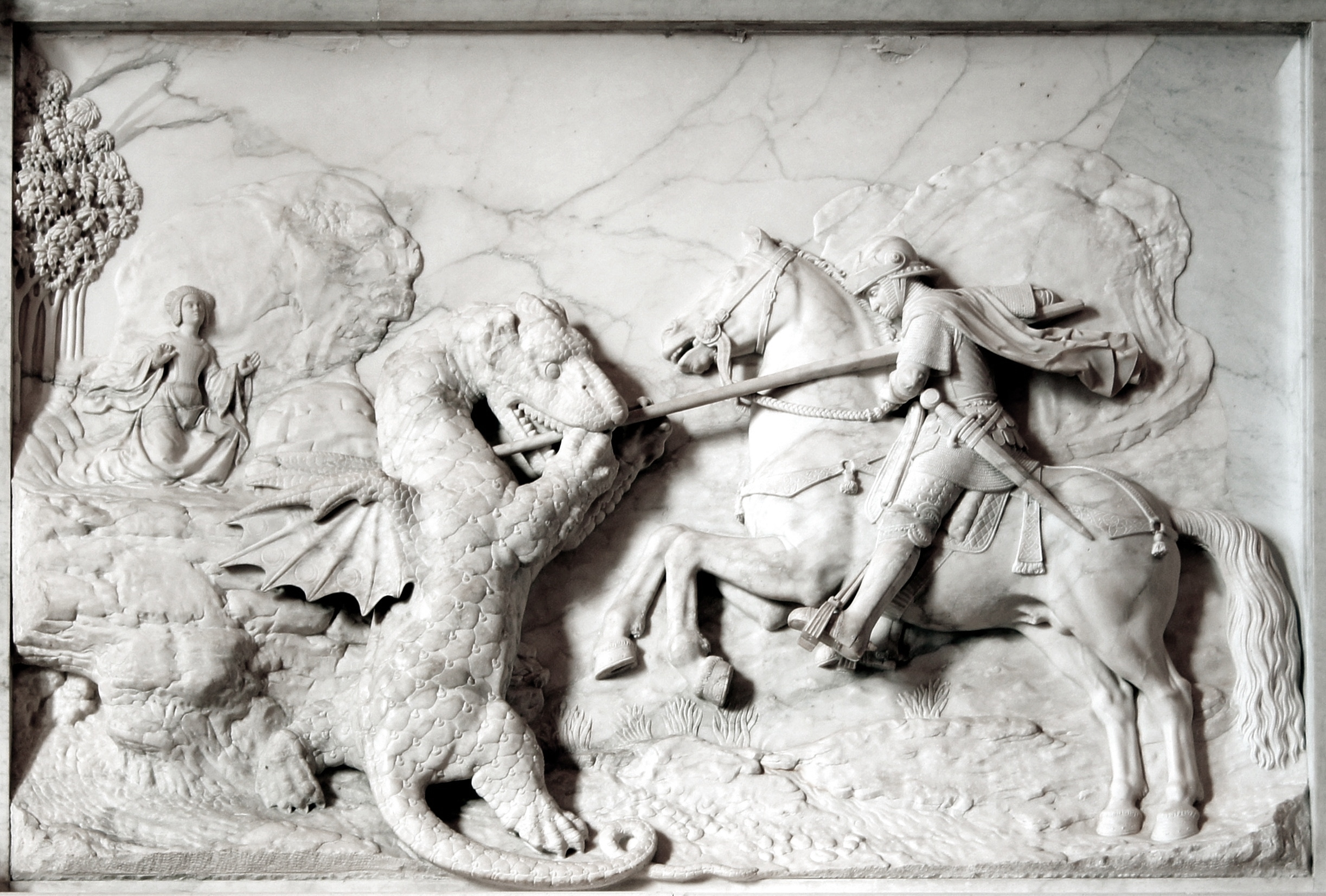 Saisie révolutionnaire, 1793 ; musée des Monuments français, 1798 ; entré au musée du Louvre en 1816